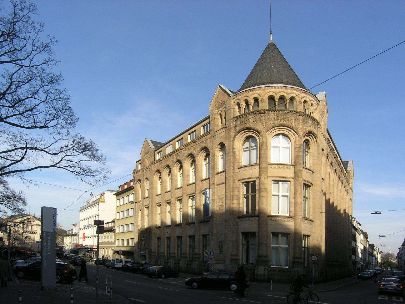 Bankhaus Veit L. Homburger in Karlsruhe, links Staatliche Münze Karlsruhe